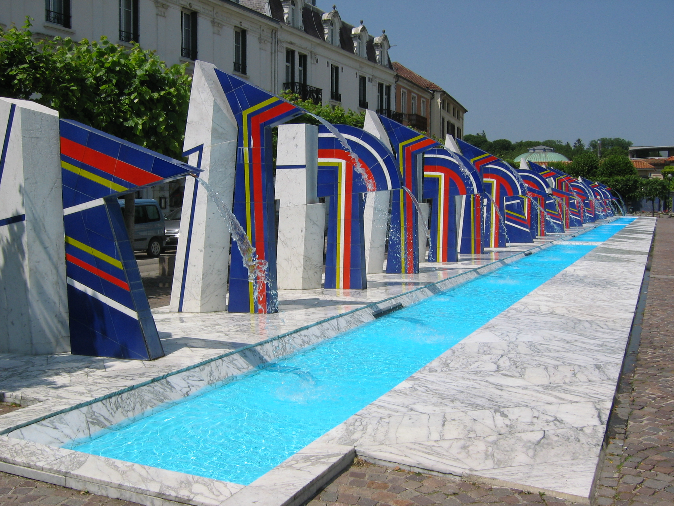 Place des fontaines : alignement de 24 fontaines sur 80 mètres, à Contrexéville, Vosges, Lorraine, France